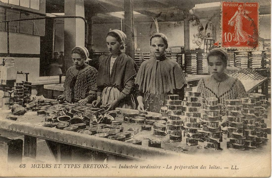 Douarnenez : la préparation des boîtes de conserve vers 1920 (carte postale Lévy et fils)